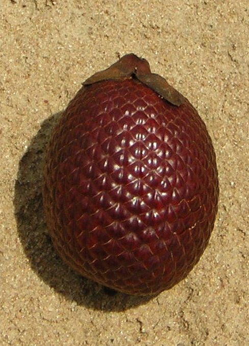 Frucht der Buriti-Palme. Mosqueiro/Belém/Pará/Brasilien